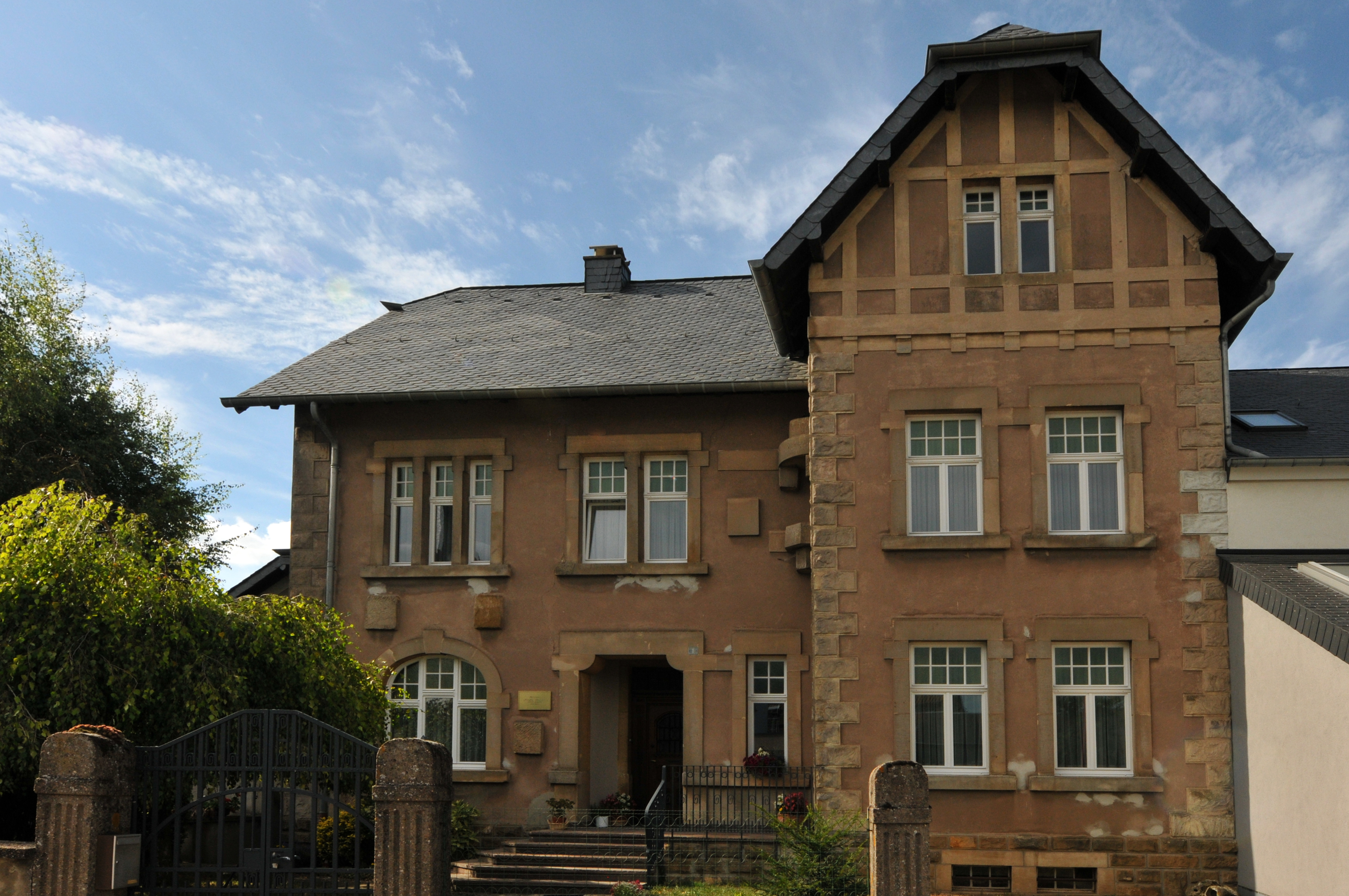 D'Heemechtshaus vum Nicolas Brücher zu Elveng.